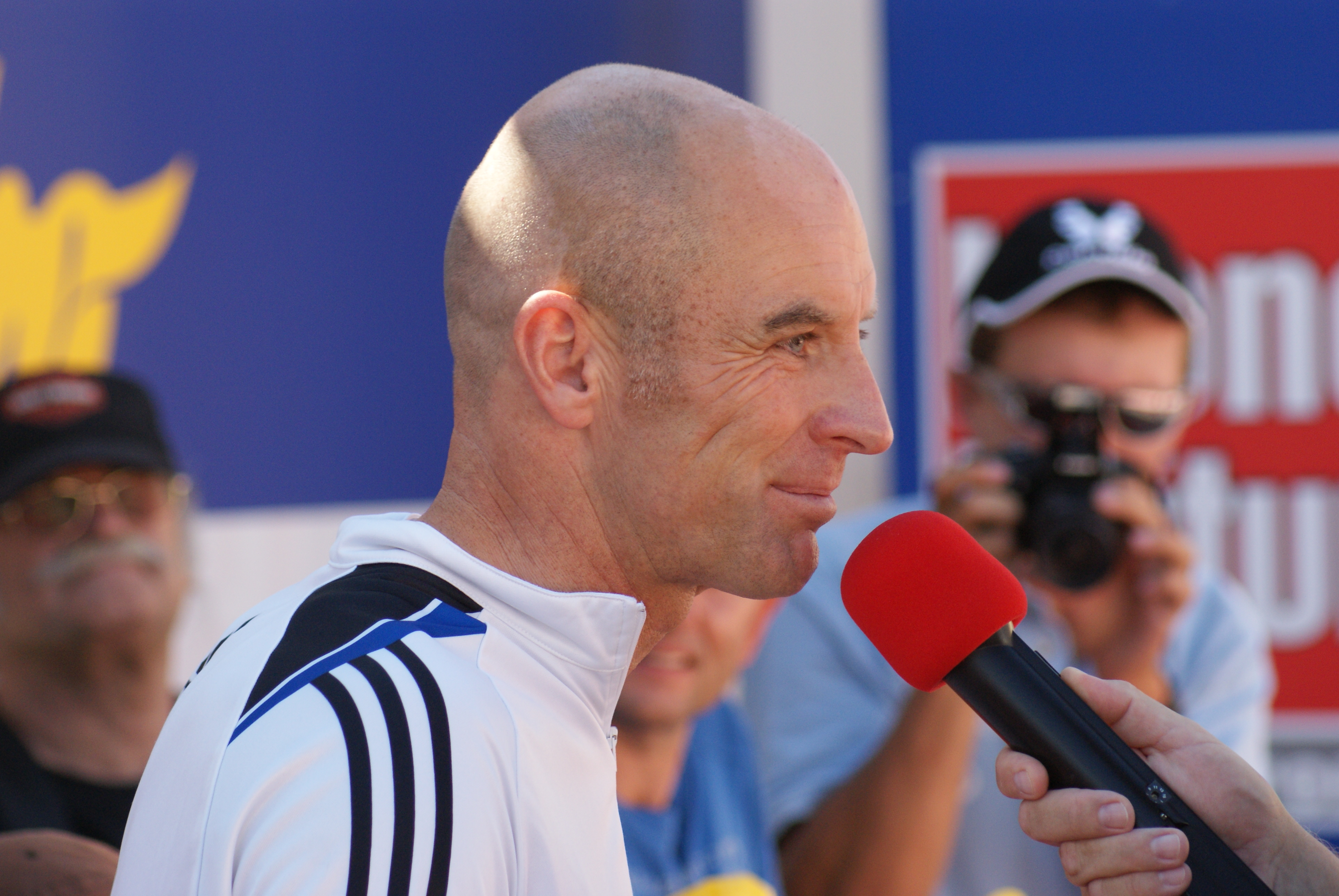 Roland Königshofer